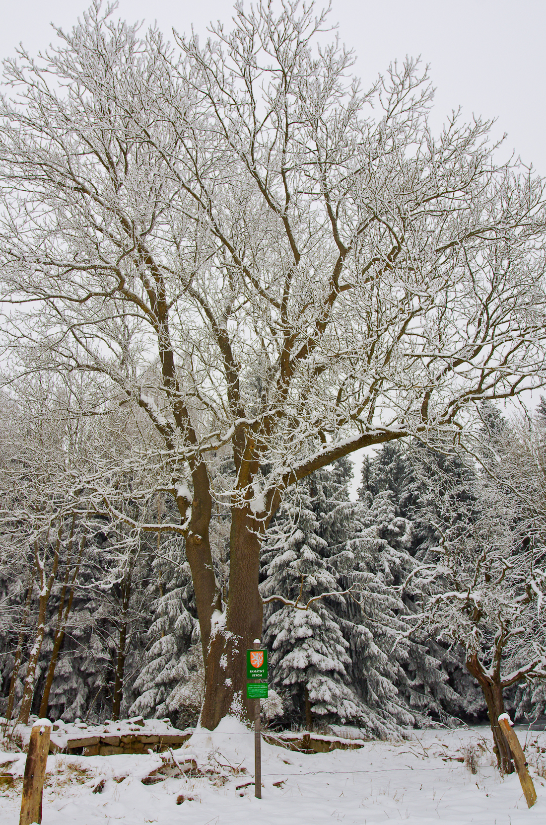 Krásná Lípa - památný strom - Jasan v bývalých Milířích, Krušné hory